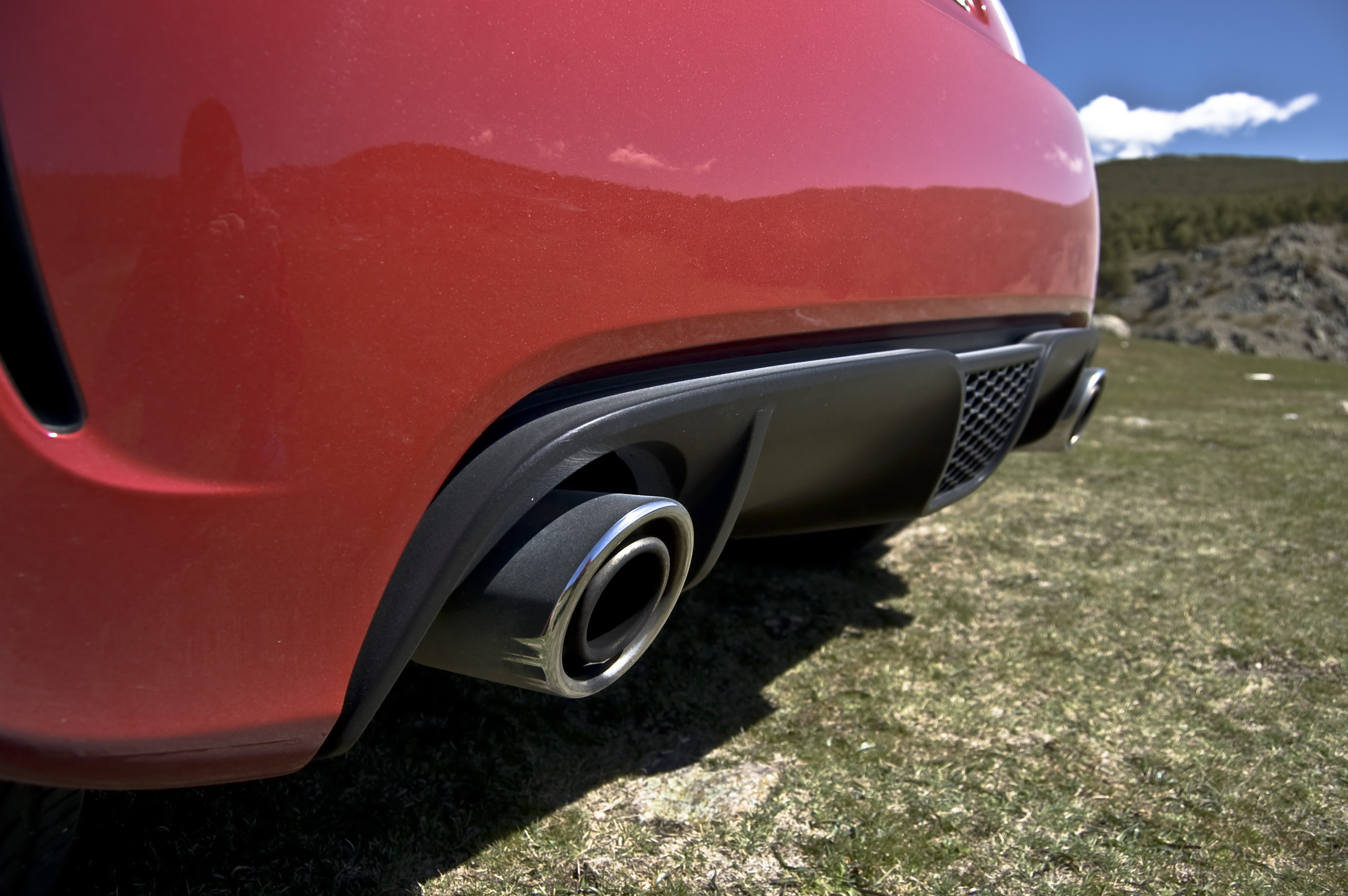 Prueba del Abarth 500 y photoshoot para Diariomotor